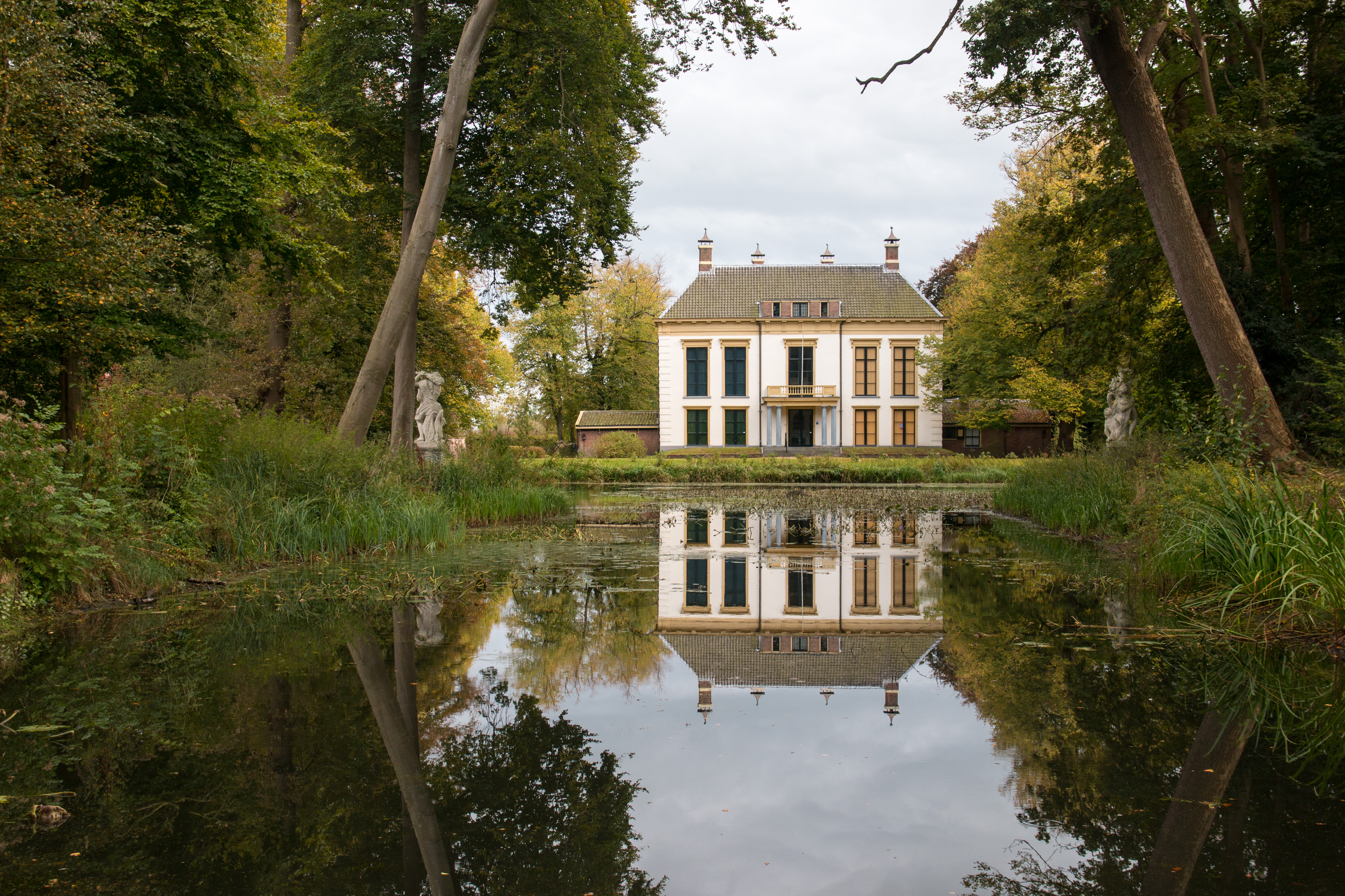 House Nijenburg, Heiloo, Holland